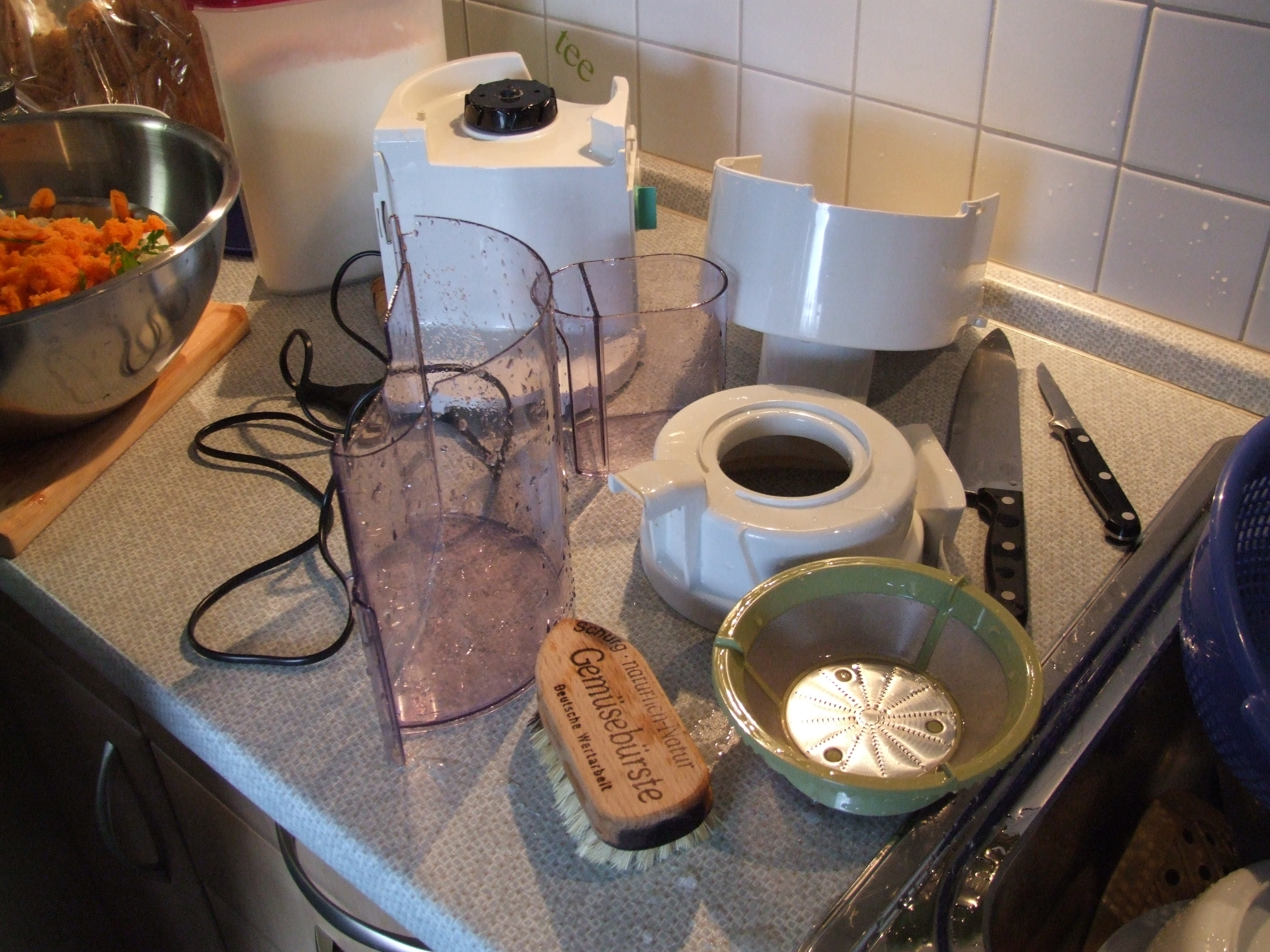 zum Reinigen zerlegter Entsafter